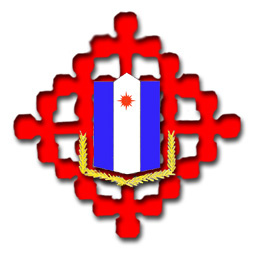 Blason de la Grande chancellerie du Pays Taï qui gère l'Ordre du Mérite Civil Taï et l'Ordre du Mérite Militaire Taï